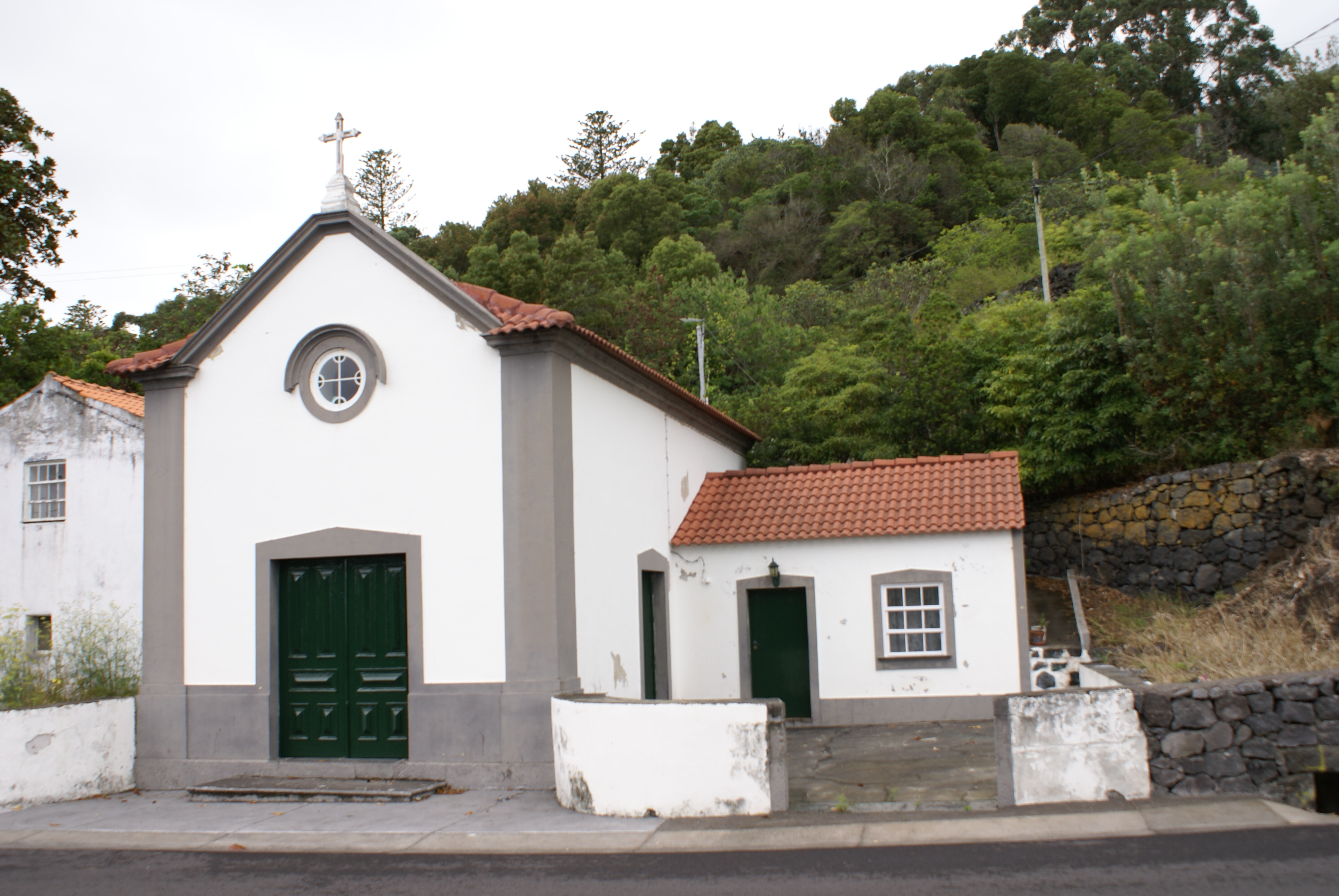 Ermida de Santa Rita de Cássia, Manadas, Velas, ilha de São Jorge, Açores